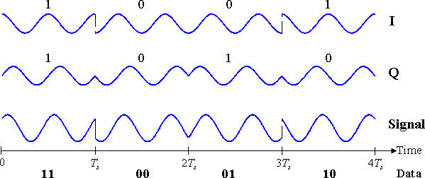 QPSK timing diagramme